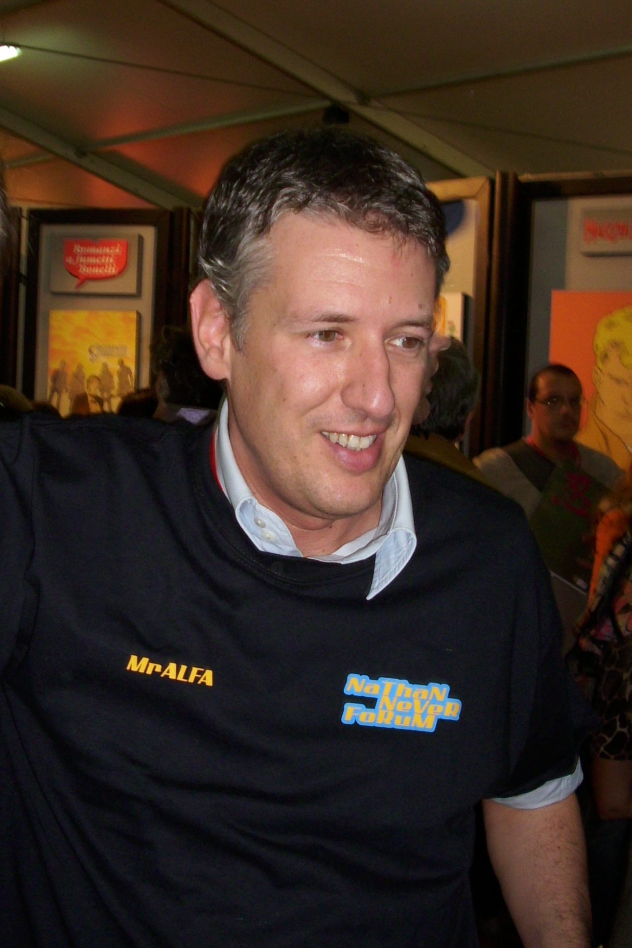 Stefano Vietti a Lucca comics and games 2008